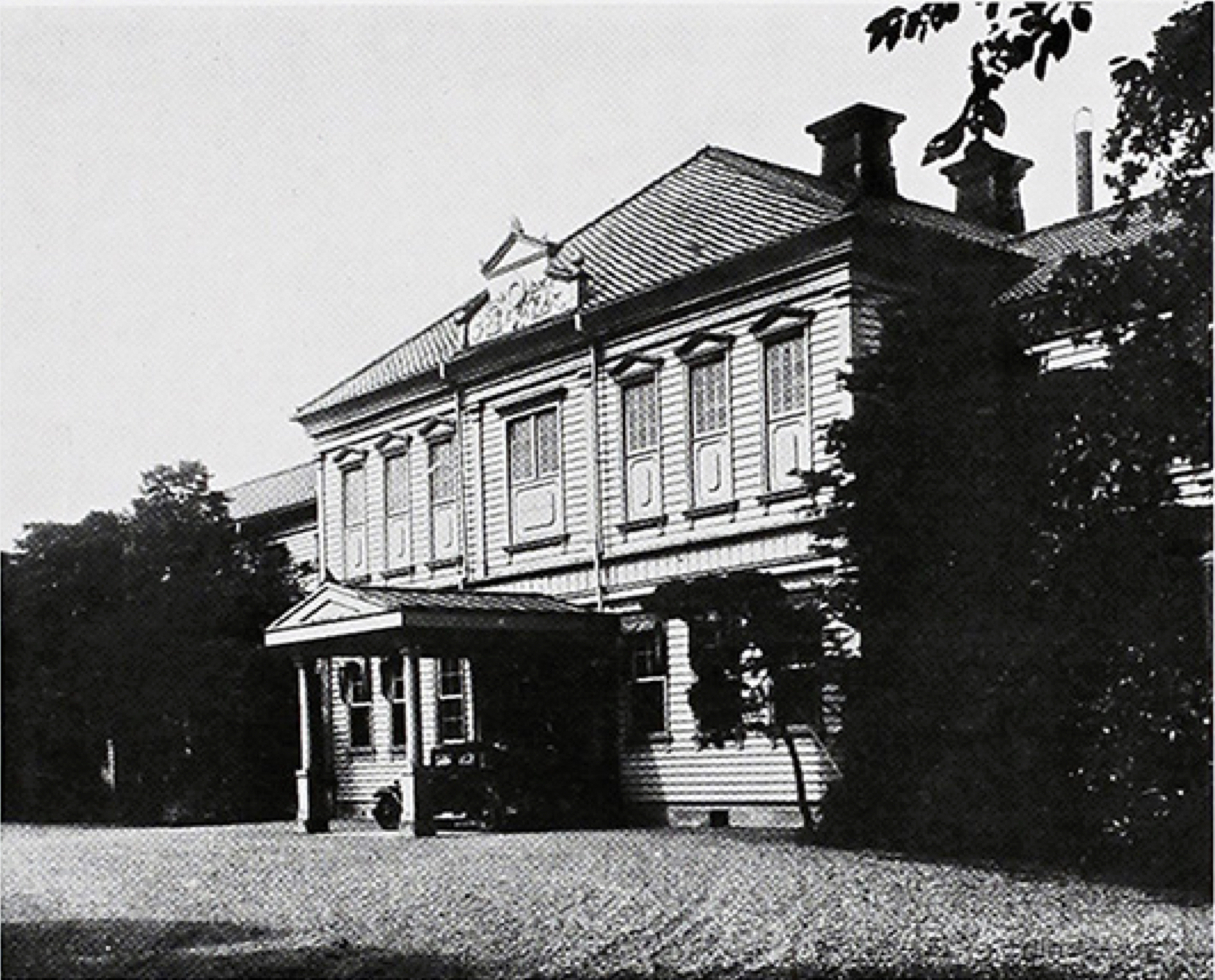 東京音楽学校奏楽堂1926年11月